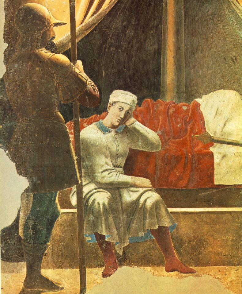 PIERO della FRANCESCA Constantine's Dream Fresco, 329 x 190 cm San Francesco, Arezzo